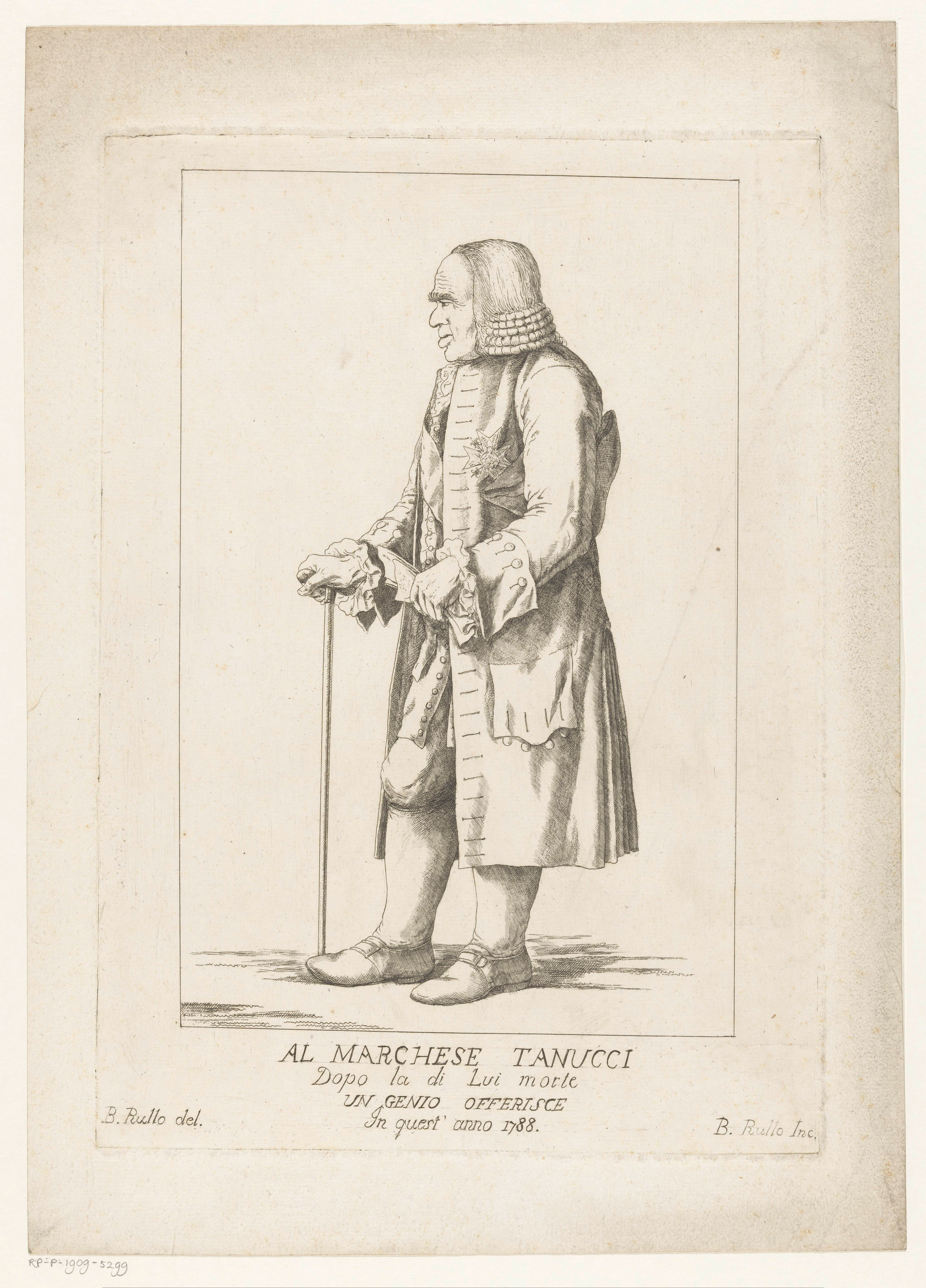 IdentificatieTitel(s): Portret van Bernardo TanucciAl Marchese Tanucci (titel op object)Objecttype: prent Objectnummer: RP-P-1909-5299Opschriften / Merken: verzamelaarsmerk, verso, gestempeld: Lugt 2228VervaardigingVervaardiger: prentmaker: B. Rullo (vermeld op object)naar eigen ontwerp van: B. Rullo (vermeld op object)Plaats vervaardiging: ItaliëDatering: 1788Fysieke kenmerken: etsMateriaal: papier Techniek: etsenAfmetingen: plaatrand: h 355 mm × b 254 mmOnderwerpWat: historical personspolitician, e.g. party leaderruler, sovereignWie: Bernardo TanucciVerwerving en rechtenVerwerving: aankoop 1905Copyright: Publiek domein